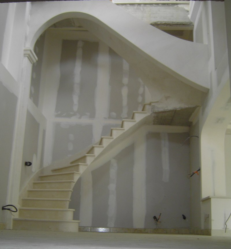 Cette photo montre deux volées d'escalier réalisées en voûte sarrasine, c'est a dire que les matériaux utilisés sont de la pierre, de la brique, et du plâtre.Cette technique date de l'époque des romains et peut être plus.